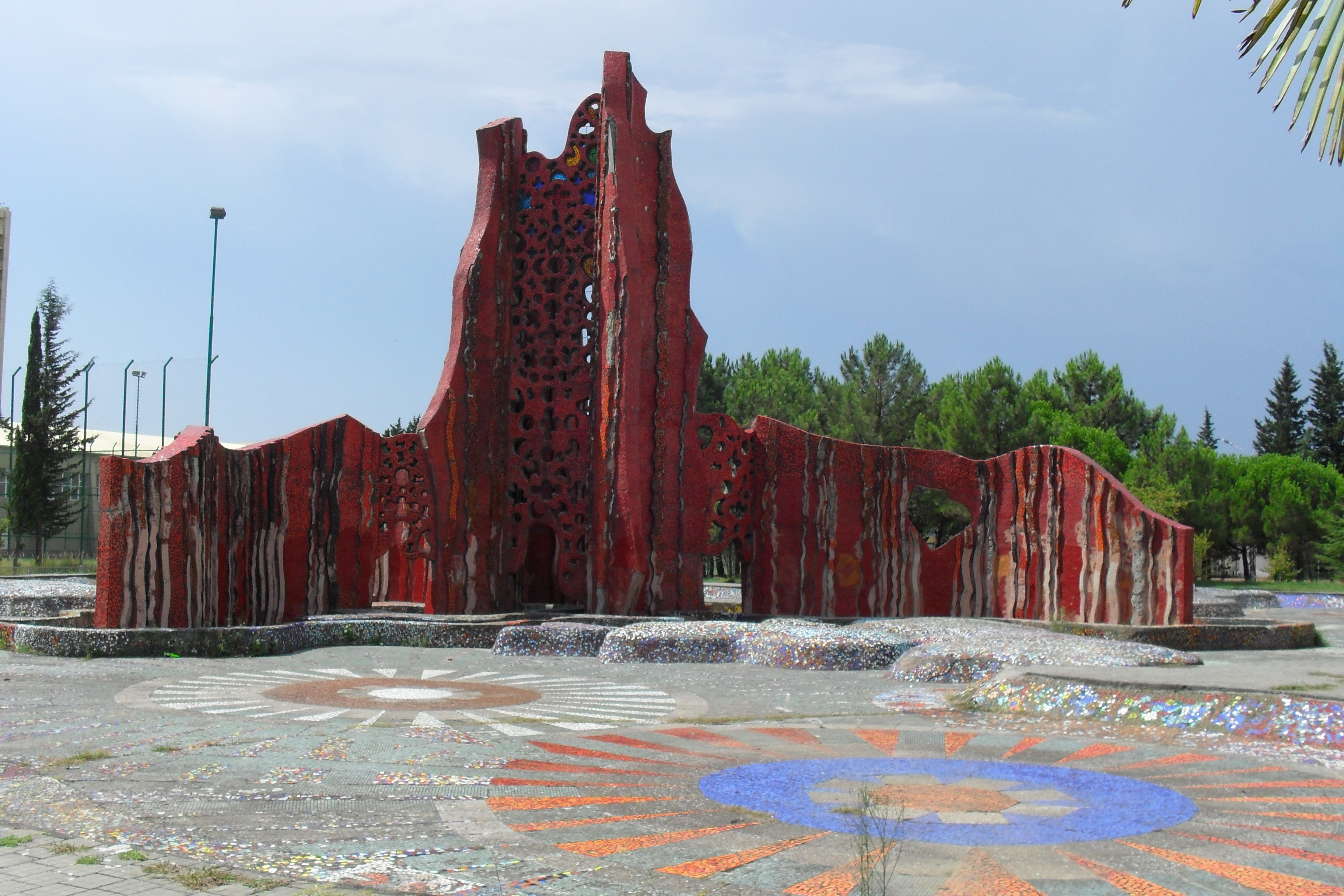 Adler, Krasnodar Krai, Russia